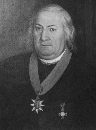 Vojtěch Zuman (1792 - 1873), Český římskokatolický kněz, spisovatel, pedagog a církevní historik